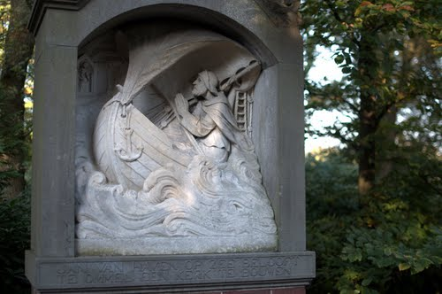 beeld in het processiepark te Ommel - Jan van Haven op zee belooft te Ommel een kerk te bouwen